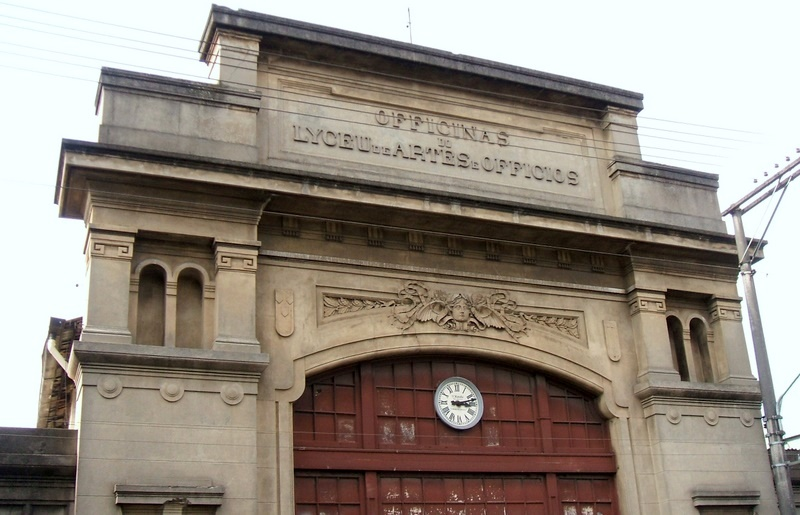 Portão das oficinas do Liceu de Artes e Ofícios de São Paulo, no distrito paulistano do Pari.